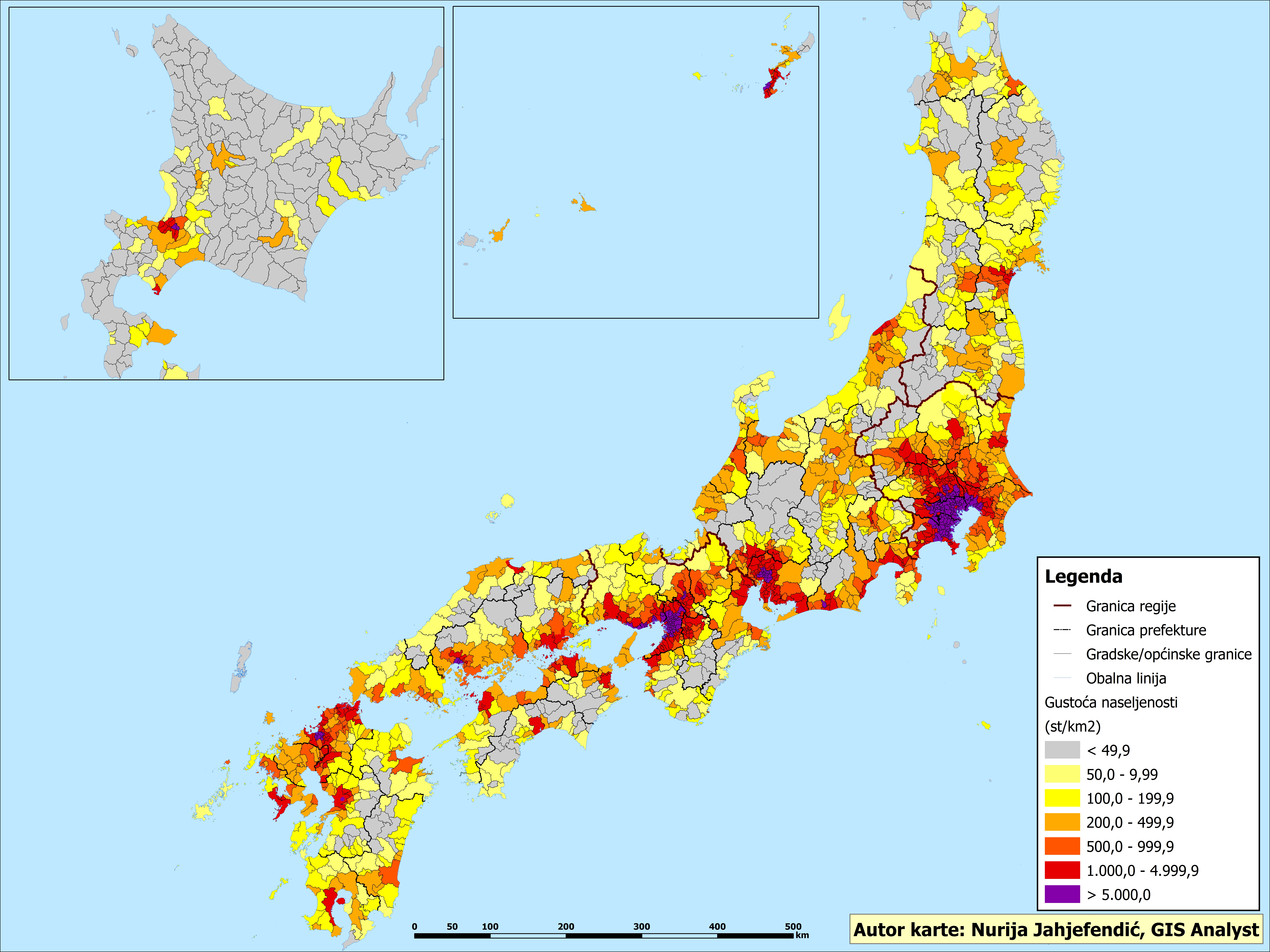 Gustoća naseljenosti po općinama/naseljima u Japanu 2015.